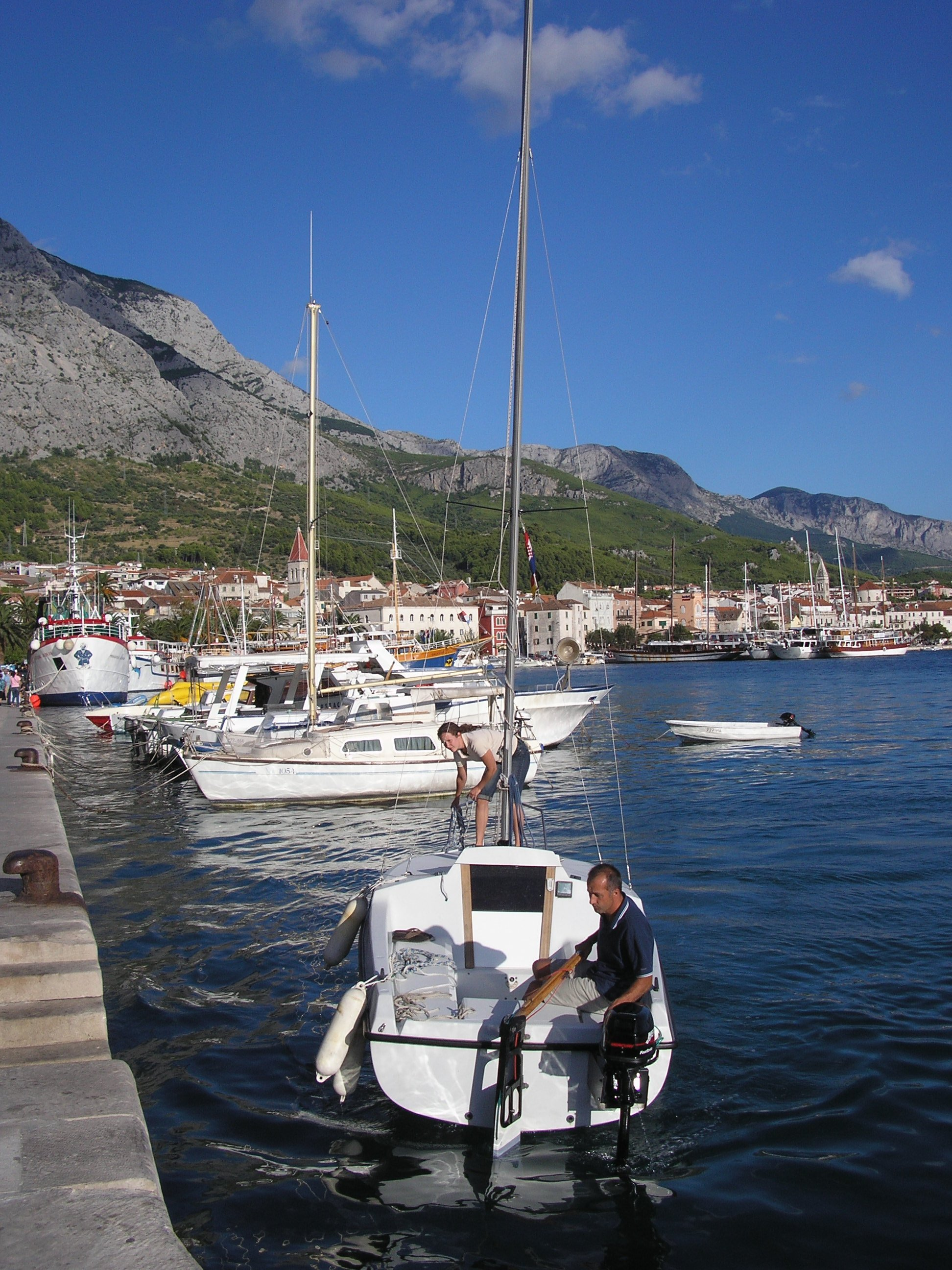 Harbour in Makarska (Croatia)